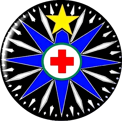 Emblema oficial de la Unidad Nacional de Rescate para Terrenos Agrestes de la Cruz Roja Mexicana desde su fundación hasta el año 2005.